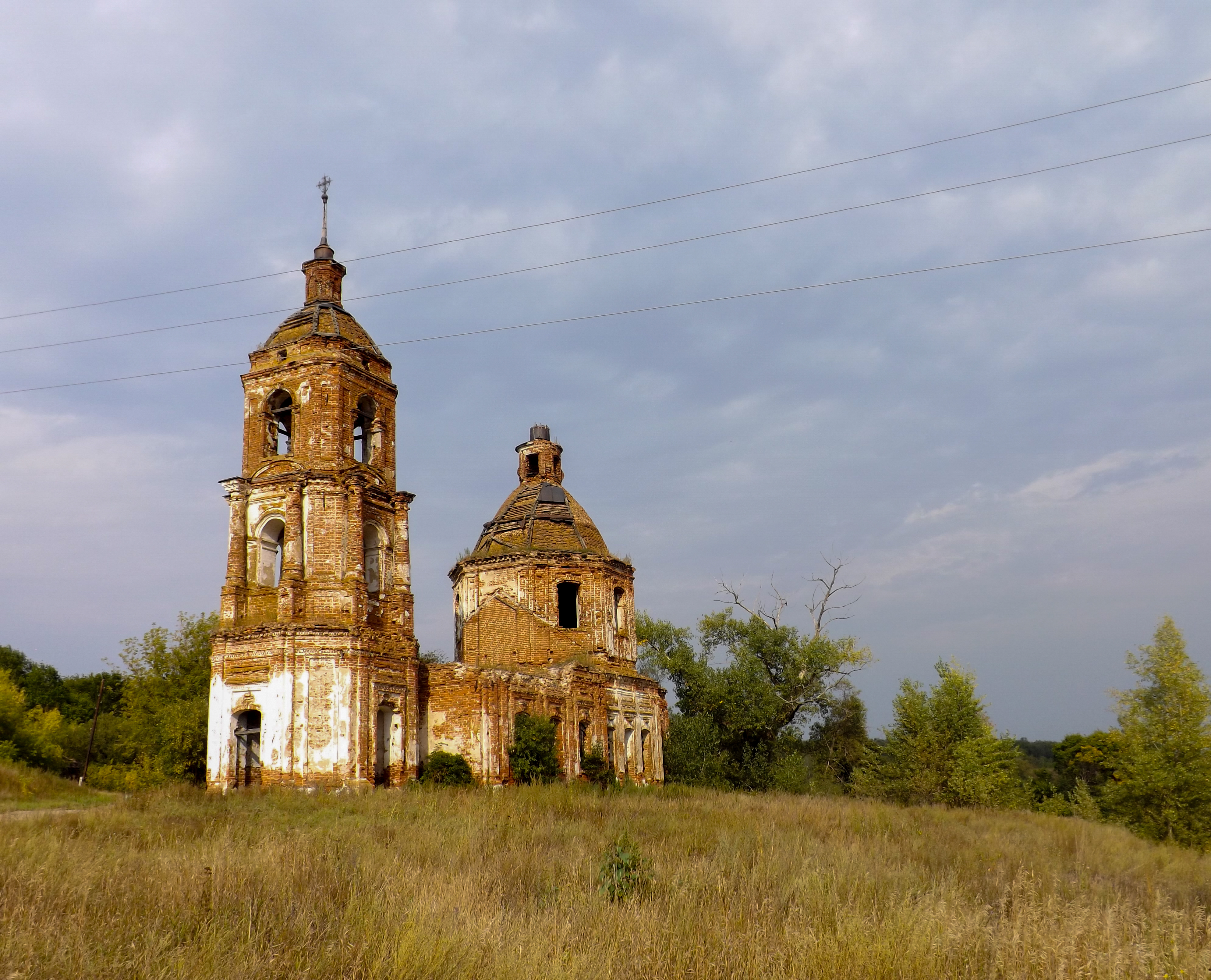 Церковь Рождества Христова: Зелёновка, Сердобский район, Пензенская область